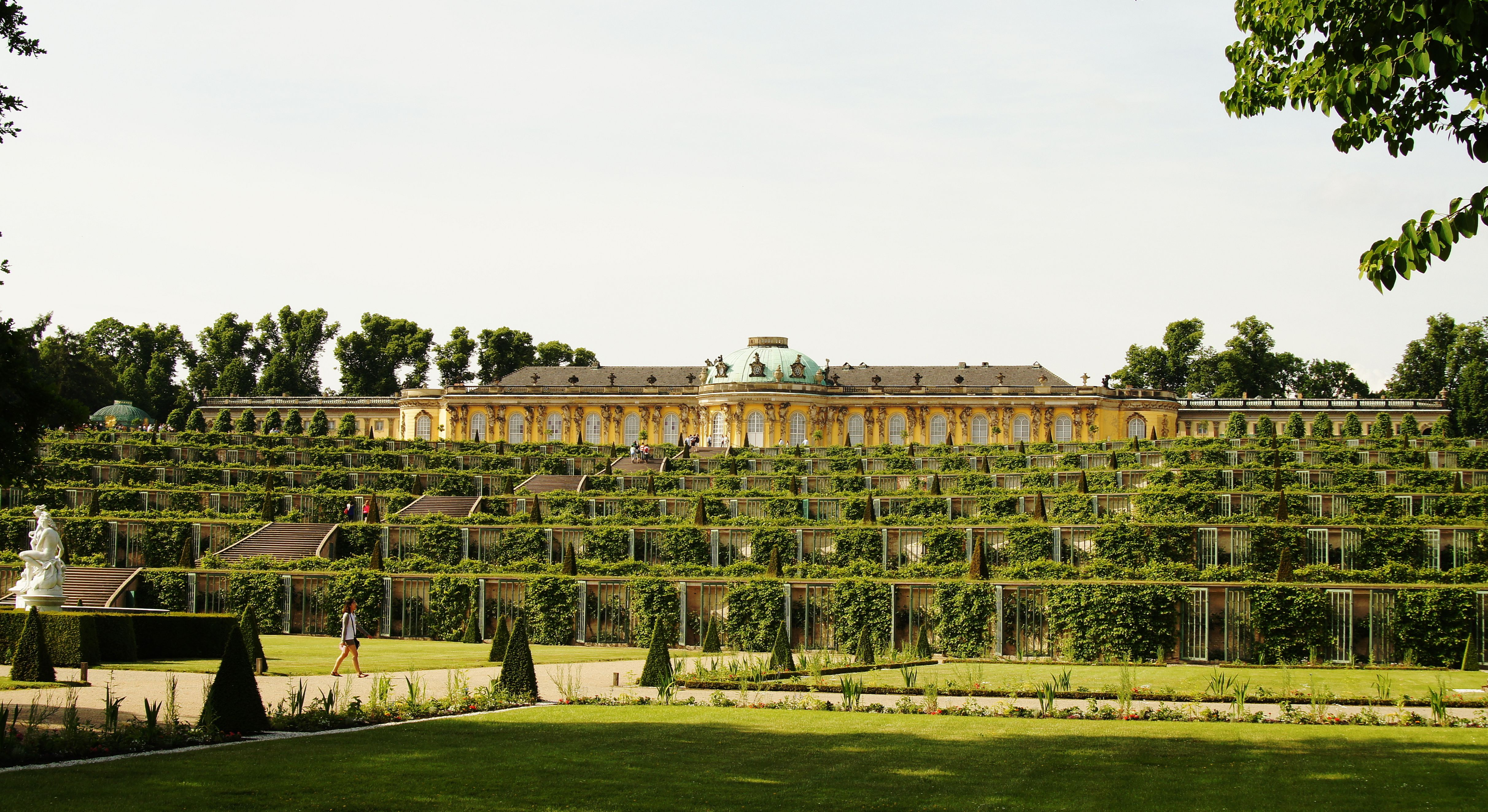 Schloss Sanssouci und Weinterrassen - Park Sanssouci - Potsdam